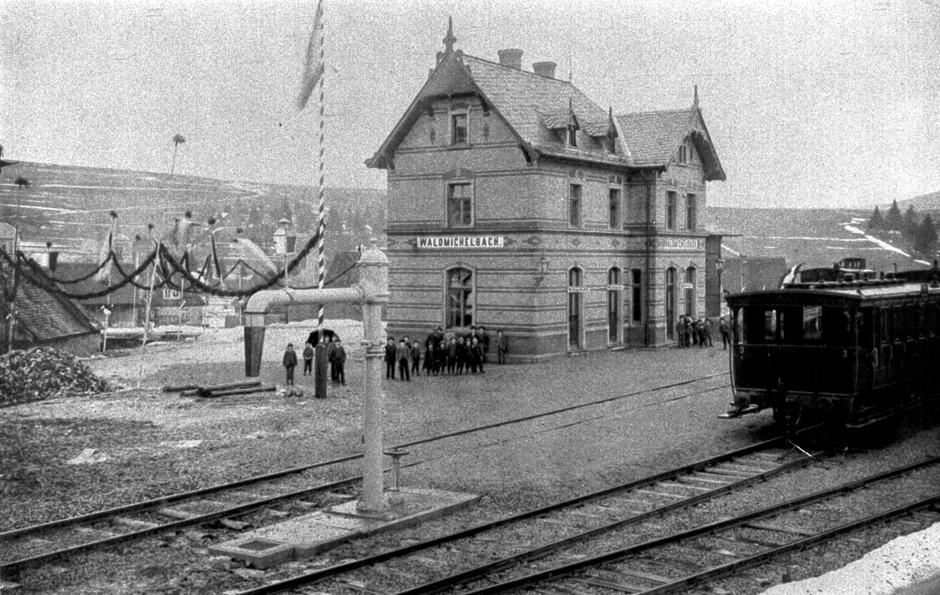 Der Bahnhof von Wald-Michelbach mit einem der ersten Züge auf der feierlich eingeweiten Überwaldbahn